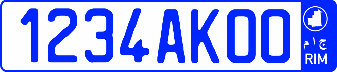 Cхема номерного знаку